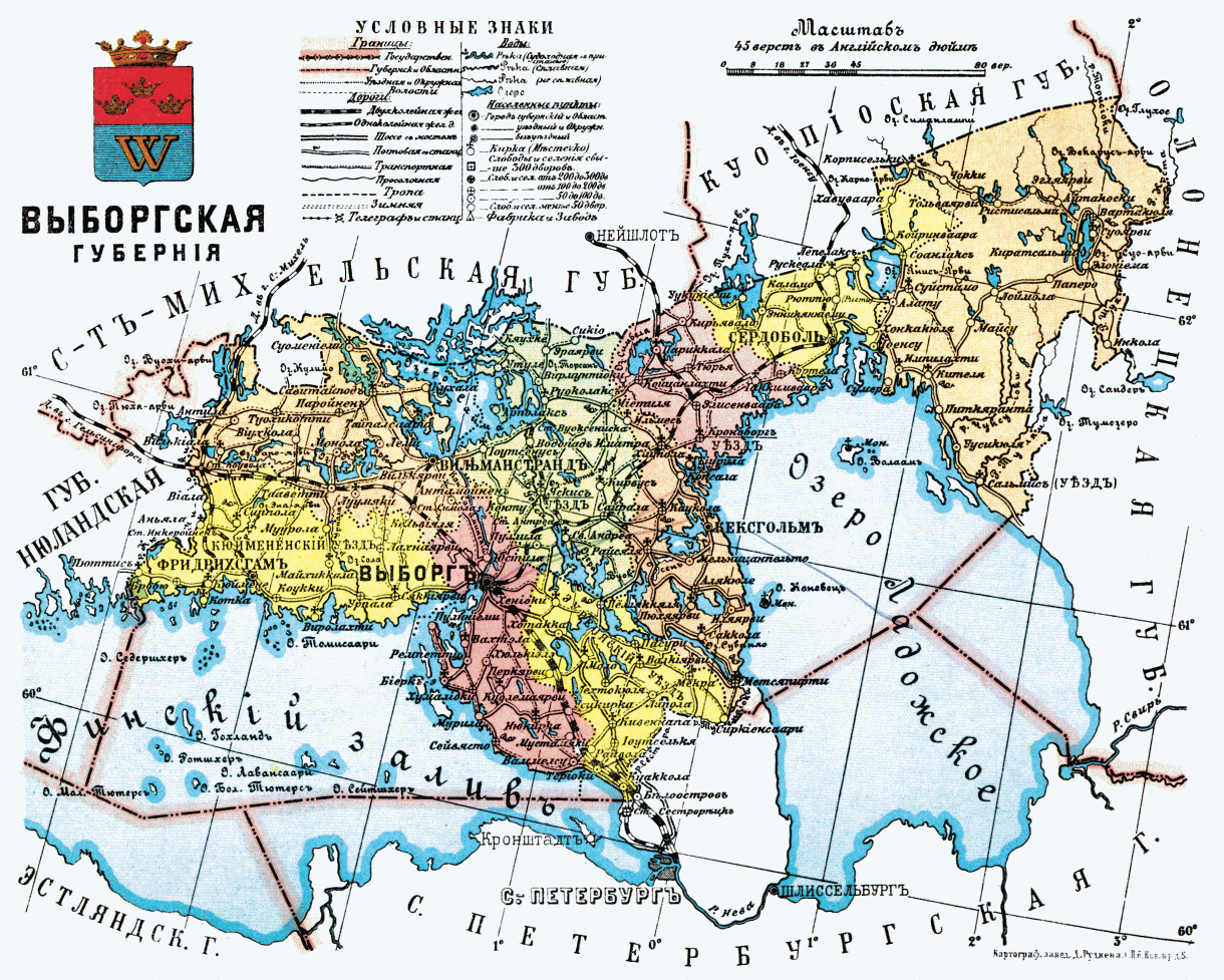 Карта Выборгской губернии, 1913